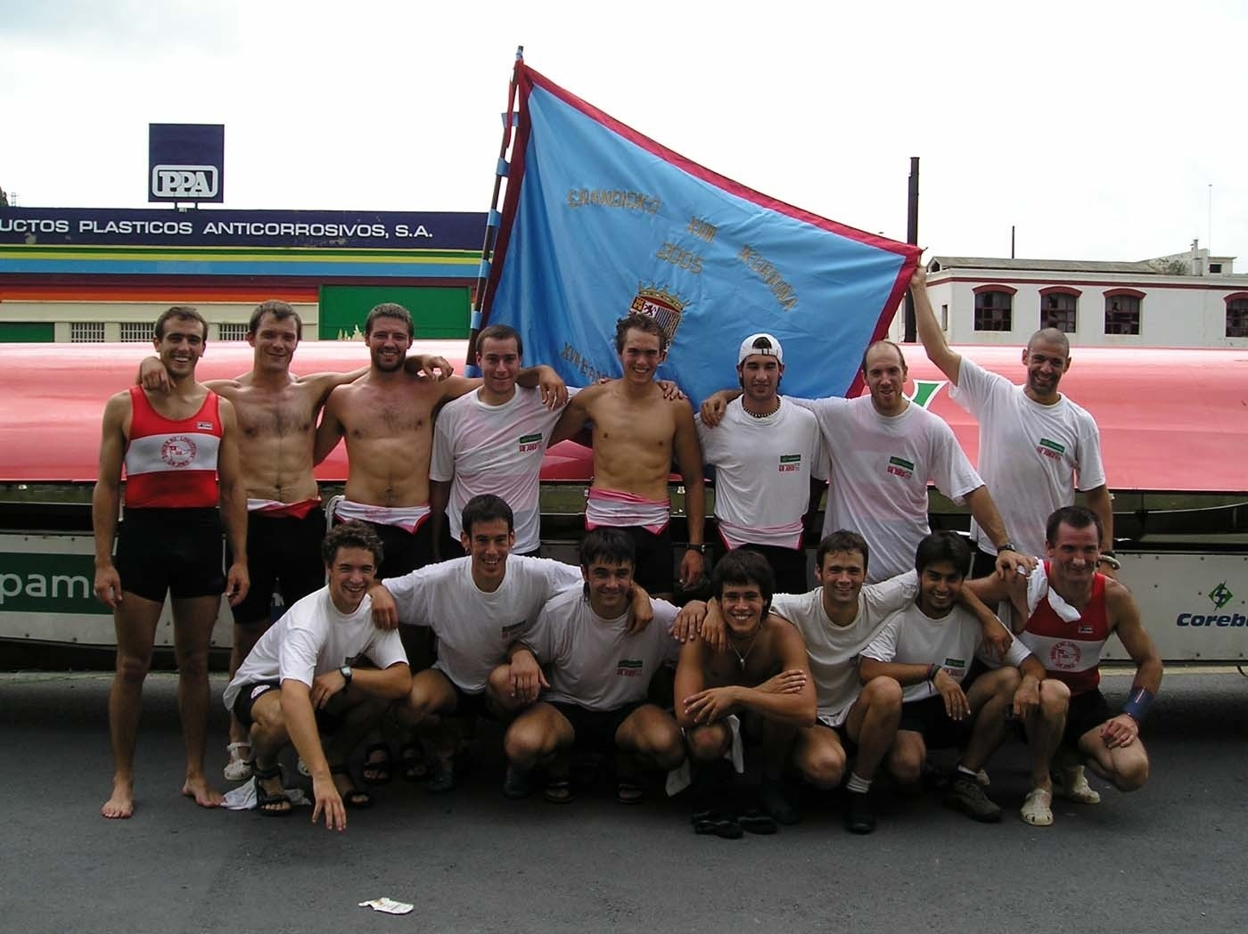 Trainière du club Ur Joko de Saint-Jean-de-Luz (Pyrénées-Atlantiques) lors du Drapeau de Lutxana.